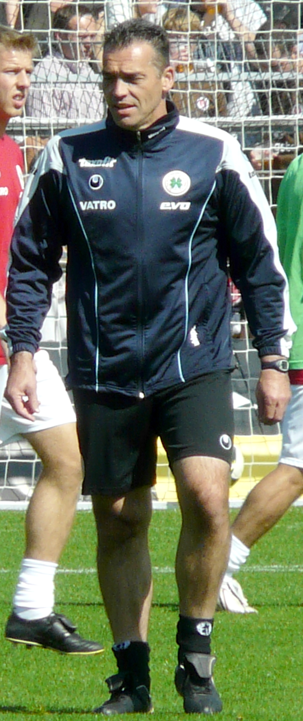 Oliver Adler